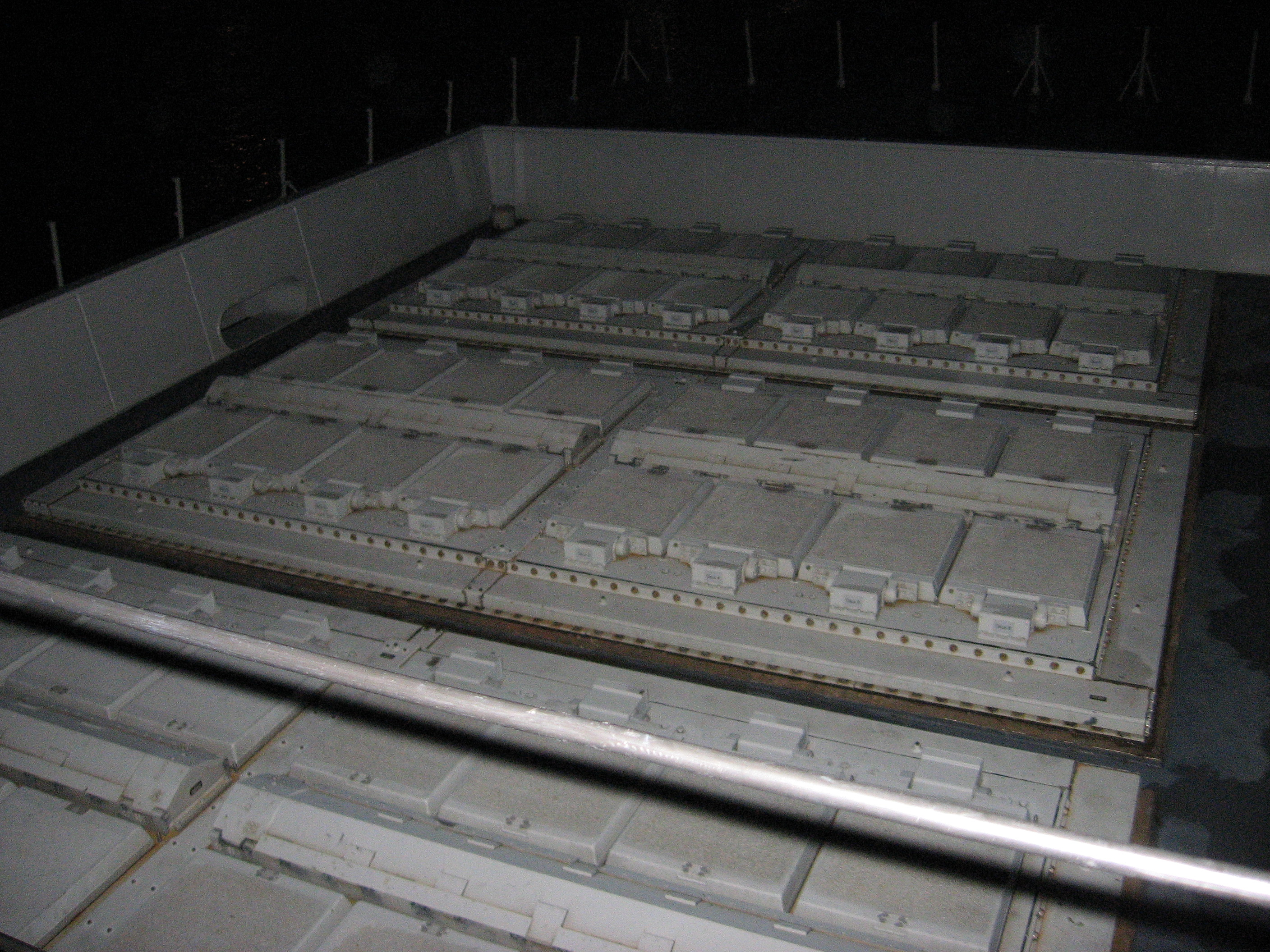 Le installazioni lancialmissili Sylver del cacciatorpediniere Caio Duilio.